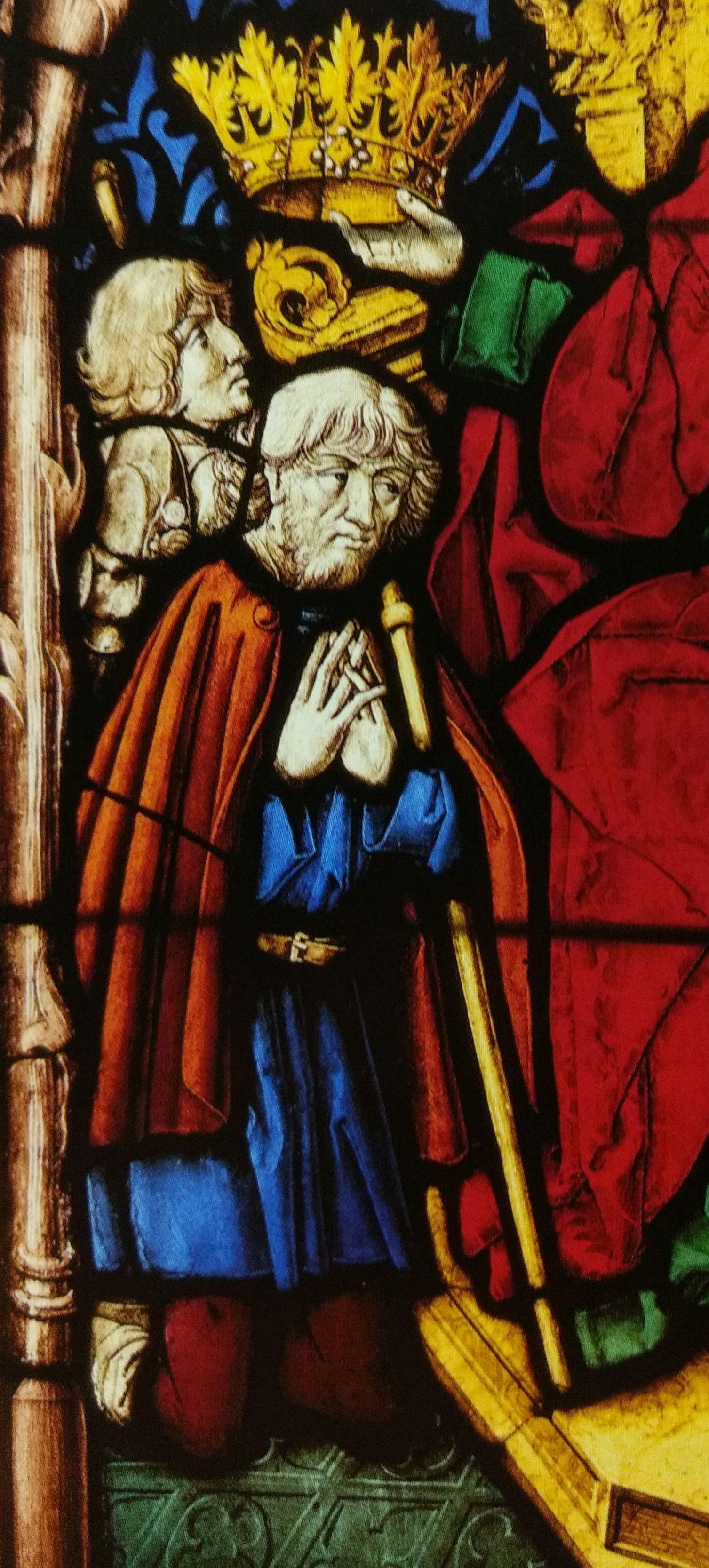 Hl. Jakobus d. Ä. krönt Pilger, Glasmalerei im Badischen Landesmuseum Karlsruhe, aus Neuweiler (Elsass). Möglicherweise sind (nach Probst) Angehörige der Herren von Lichtenberg bzw. Hanau-Lichtenberg dargestellt. Der bärtige Pilger soll Jakob von Lichtenberg gest. 1480 sein.